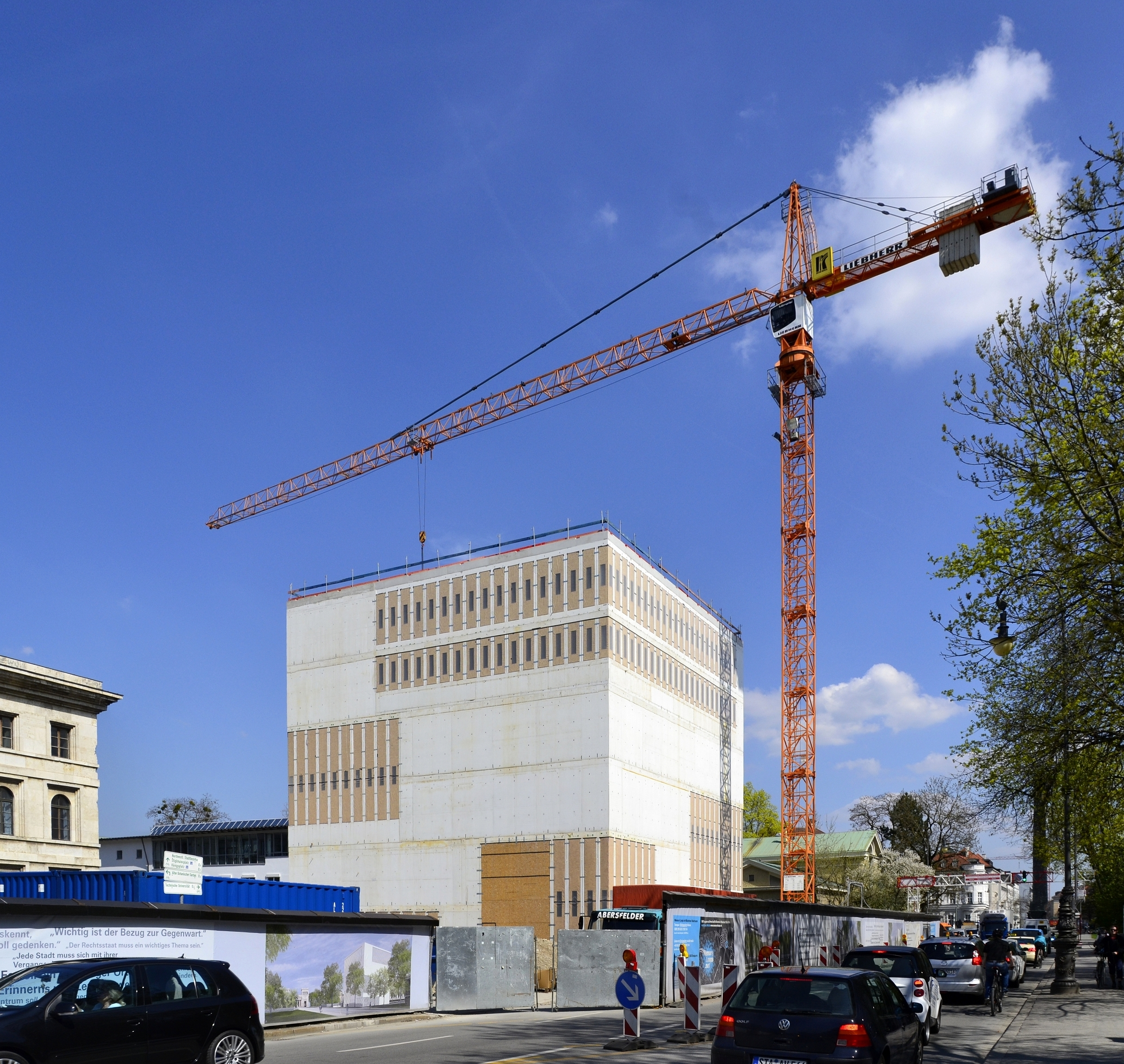 NS-Dokumentationszentrum in München an der Brienner Straße; Baustelle im April 2013.